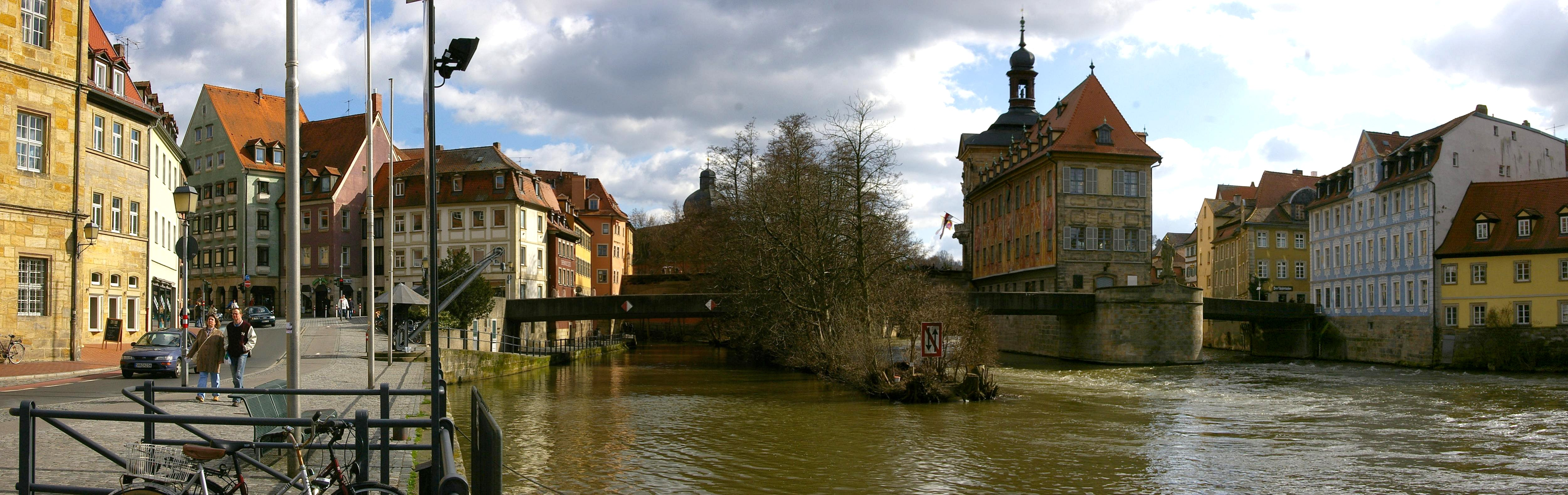 Bamberg - Altes Rathaus vom Kranen aus gesehen